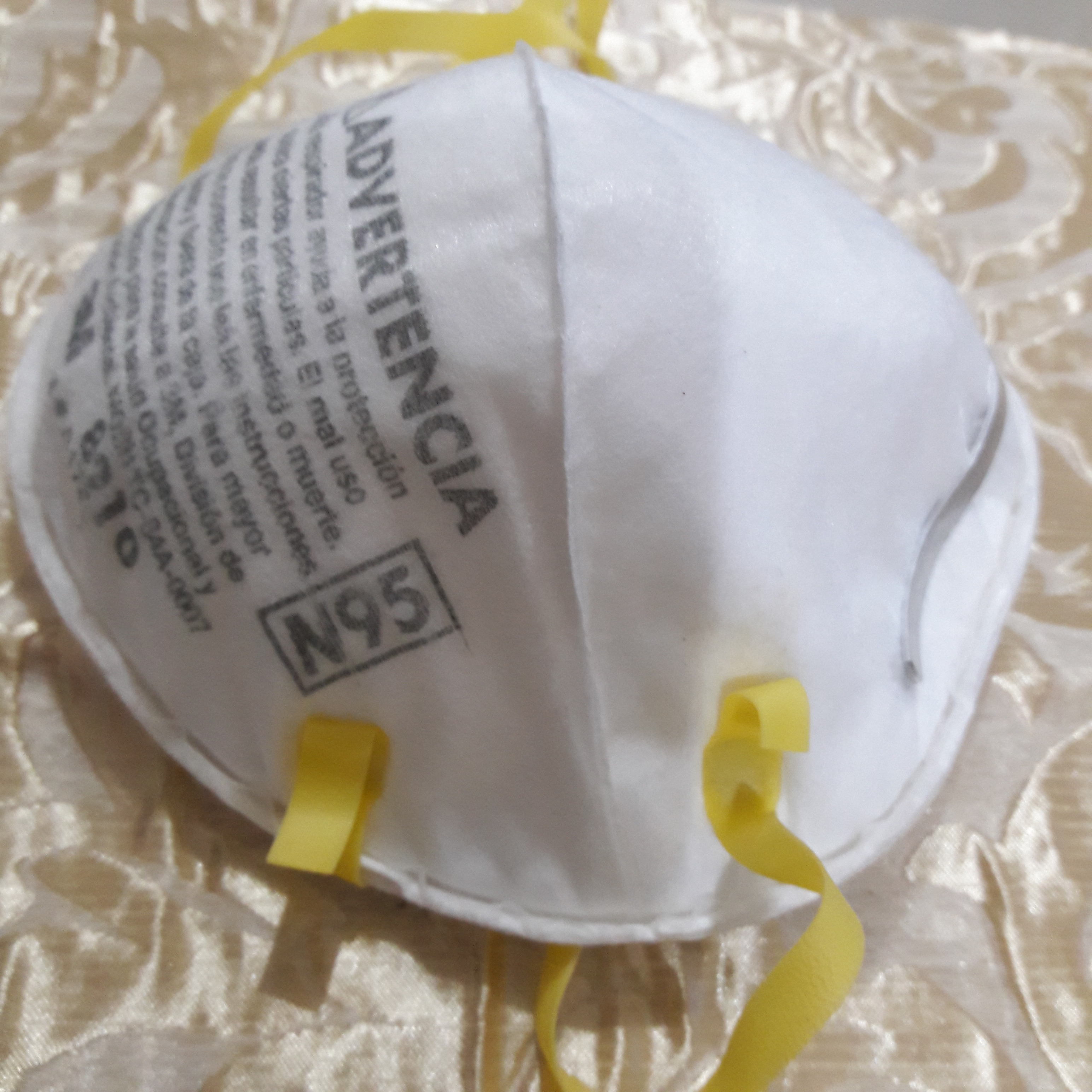 Mascarilla N95